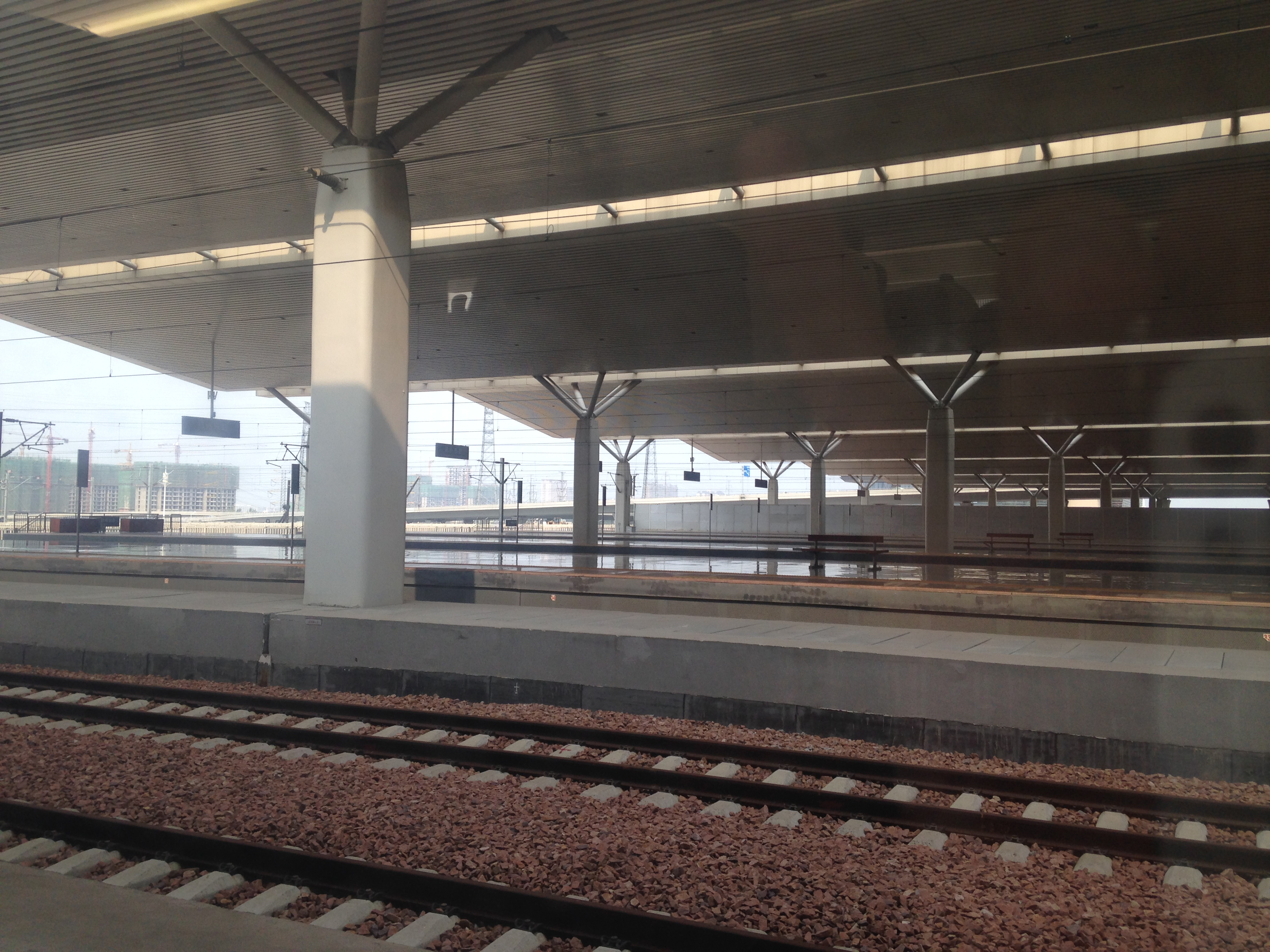 北京西行きの高速鉄道列車より望む鄭州東駅